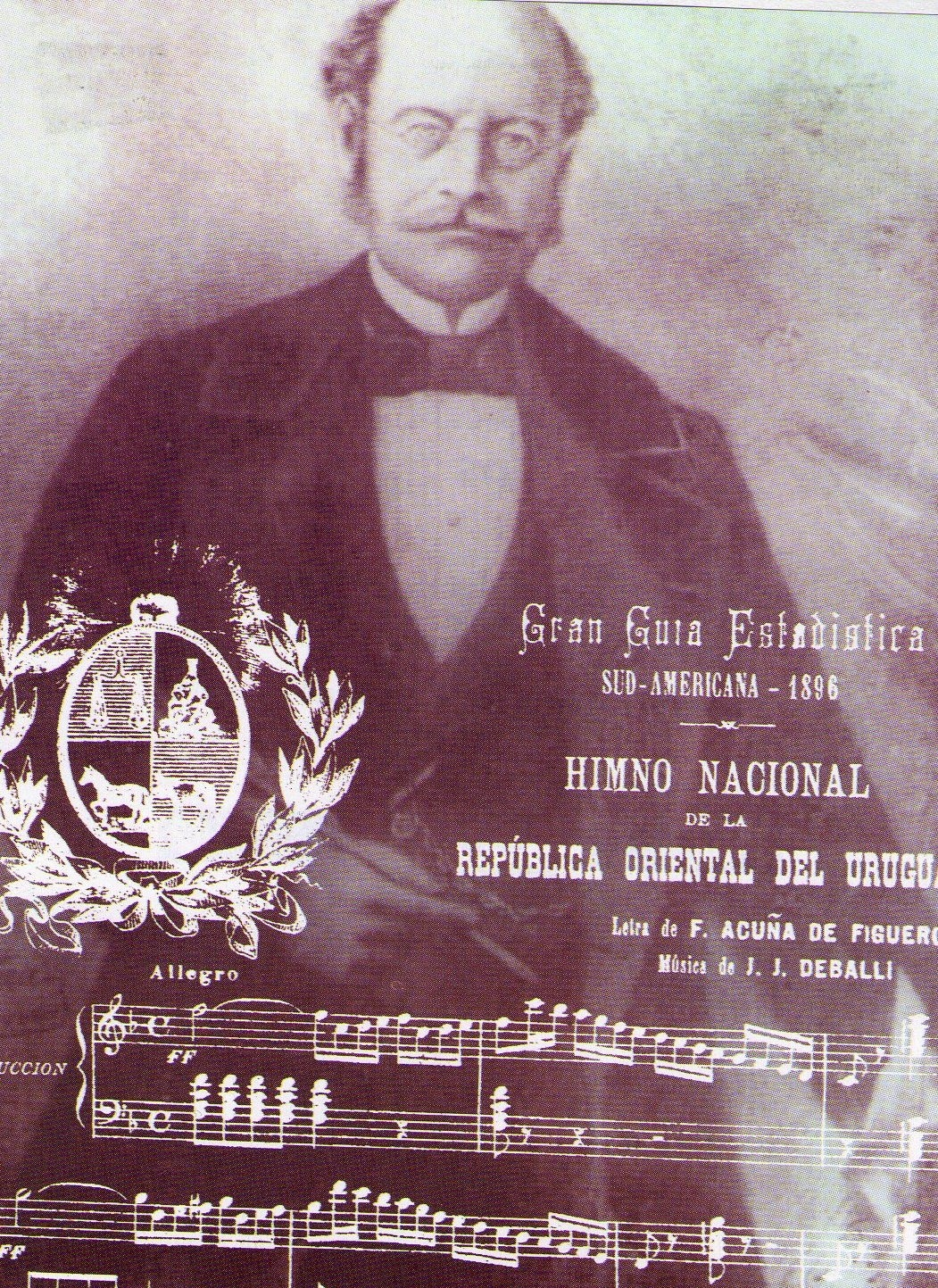 Debály Ferenc József magyar zeneszerző, karmester.